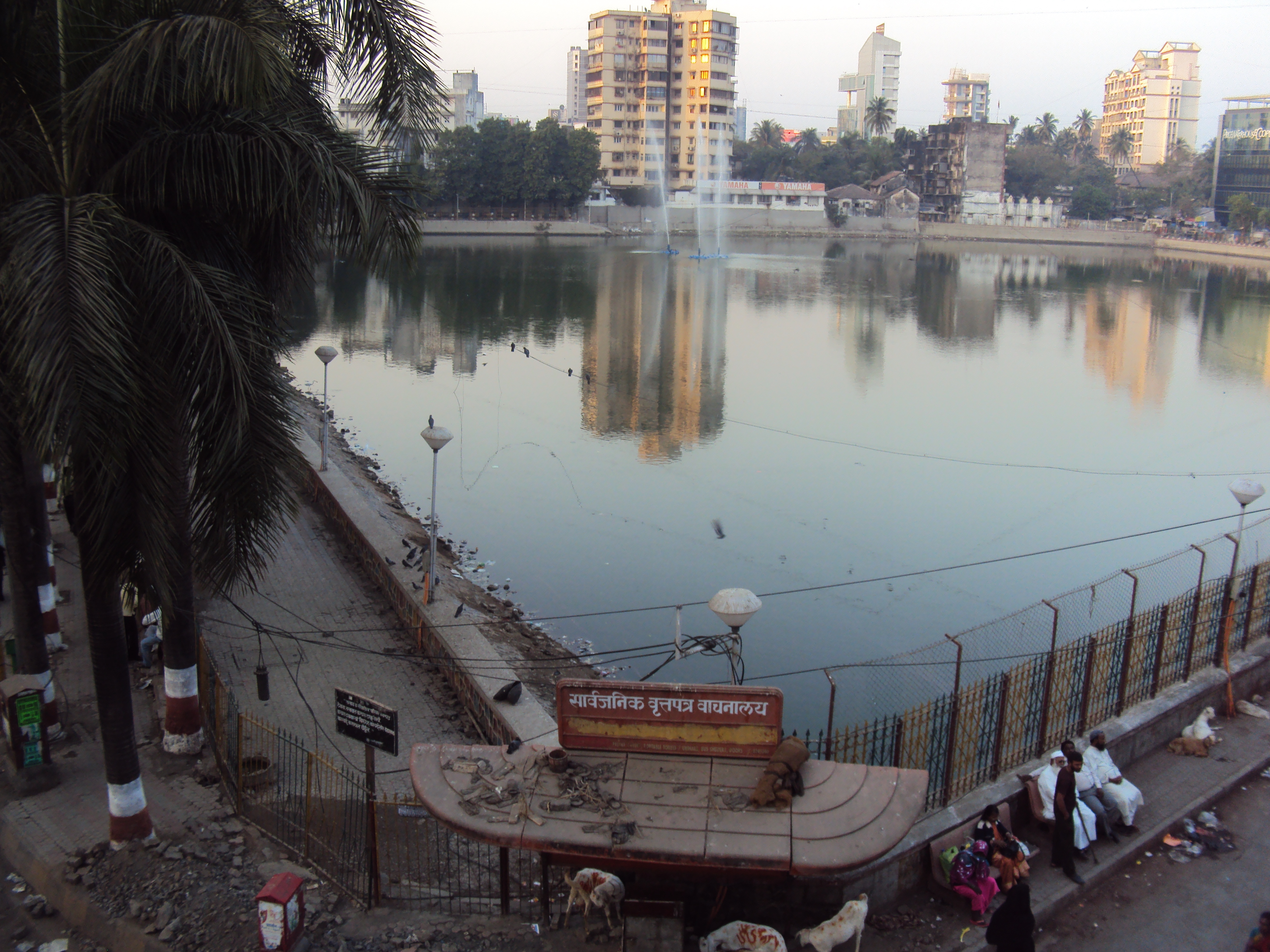 Bandra Talao